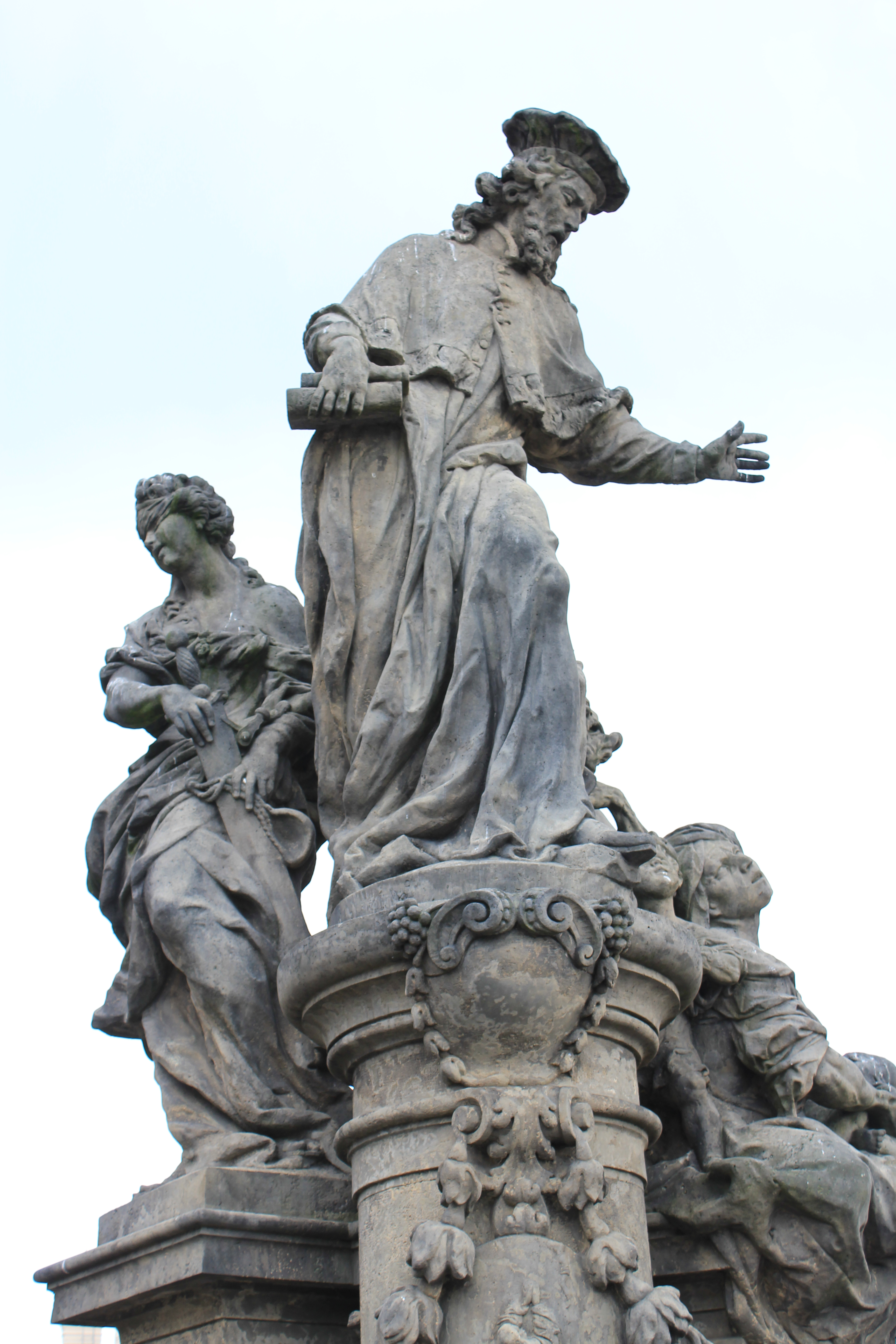 statue